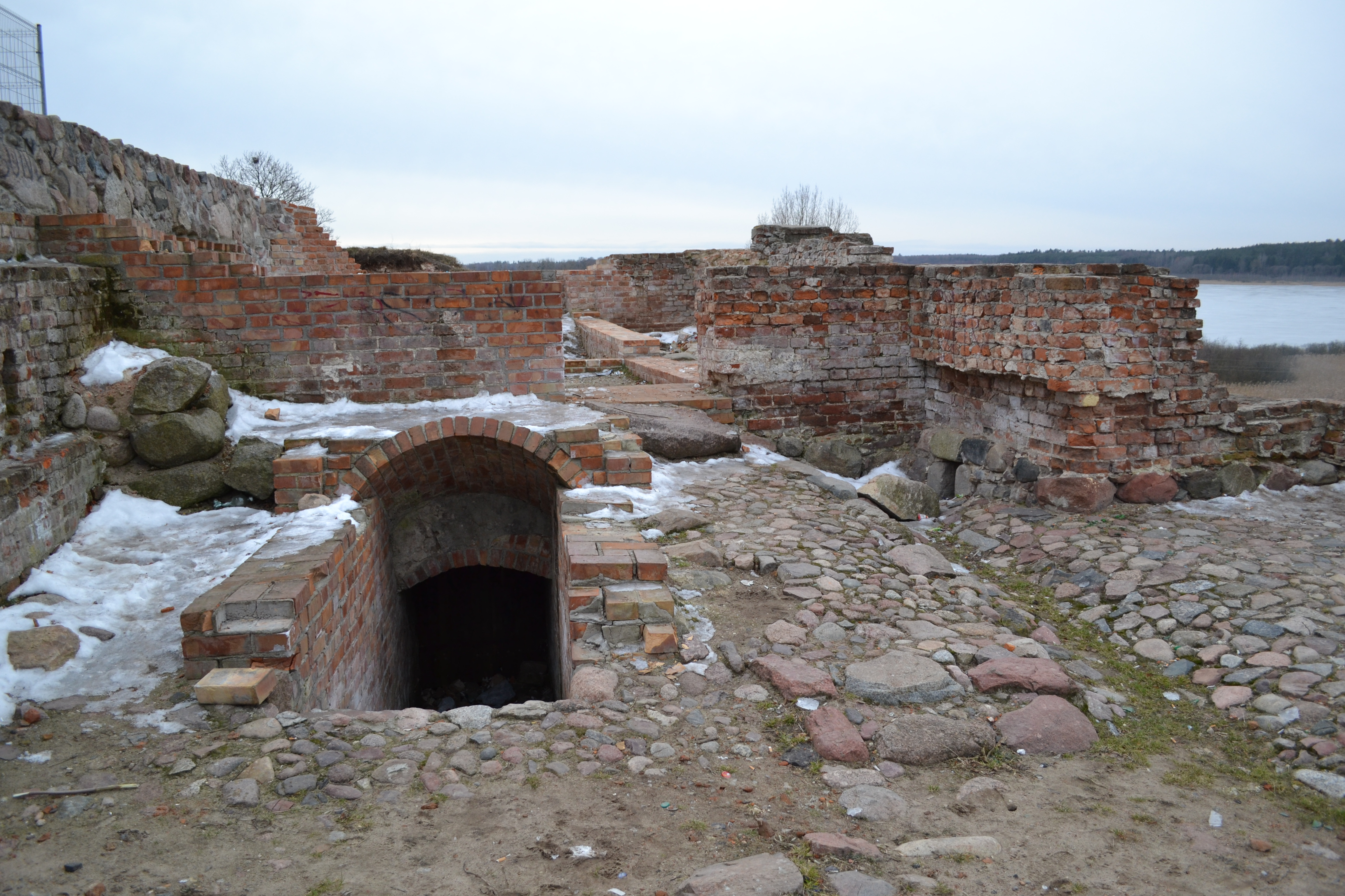 Prabuty, ul. Miła / ul. Mazurska - relikty zamku biskupów pomezańskich (zabytek nr 87)